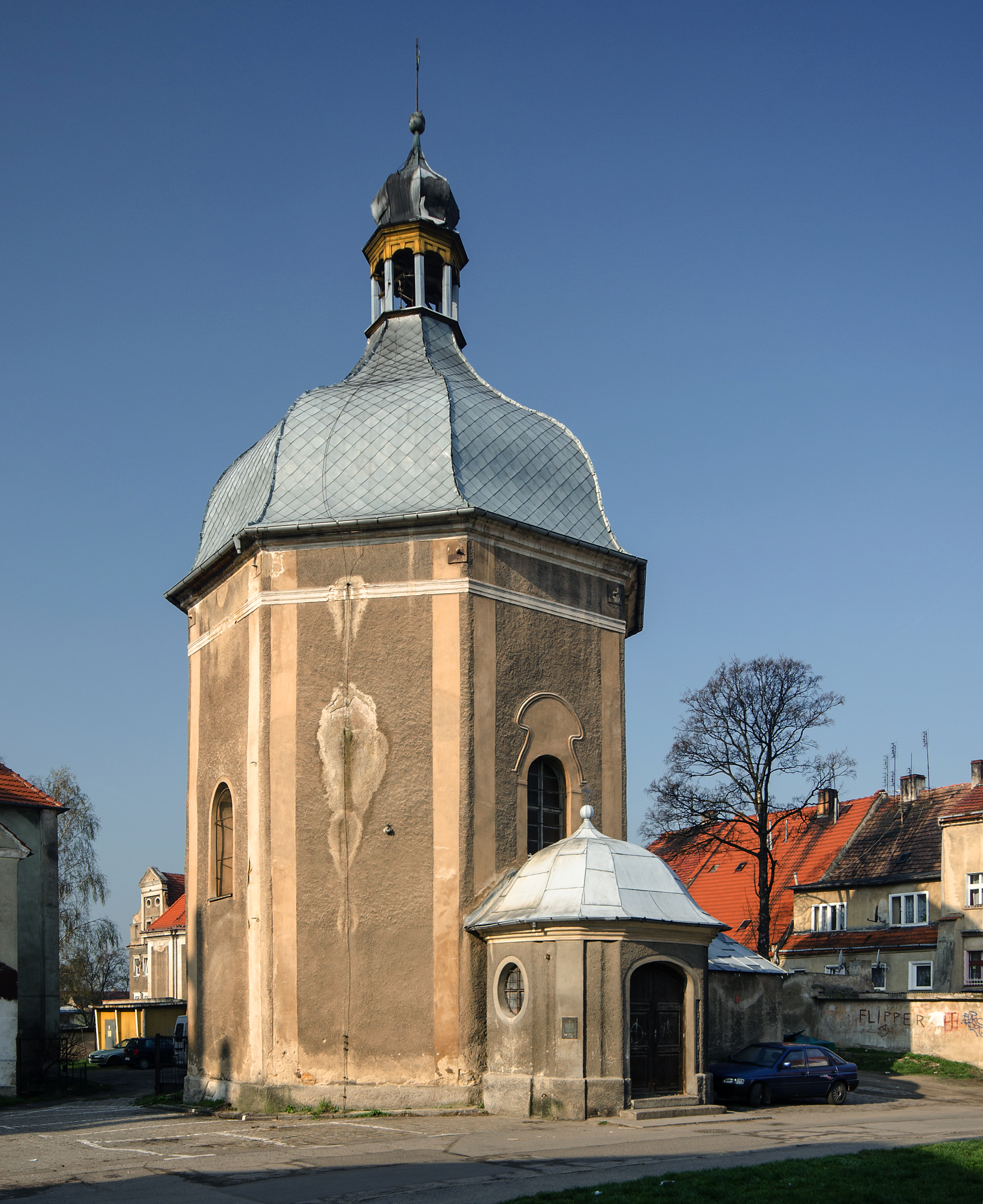 Jawor, ul. Czarnieckiego - kaplica szpitalna p.w. św. Wojciecha, XIV, XIX/XX